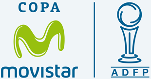 Logo del Campeonato Descentralizado de Perú